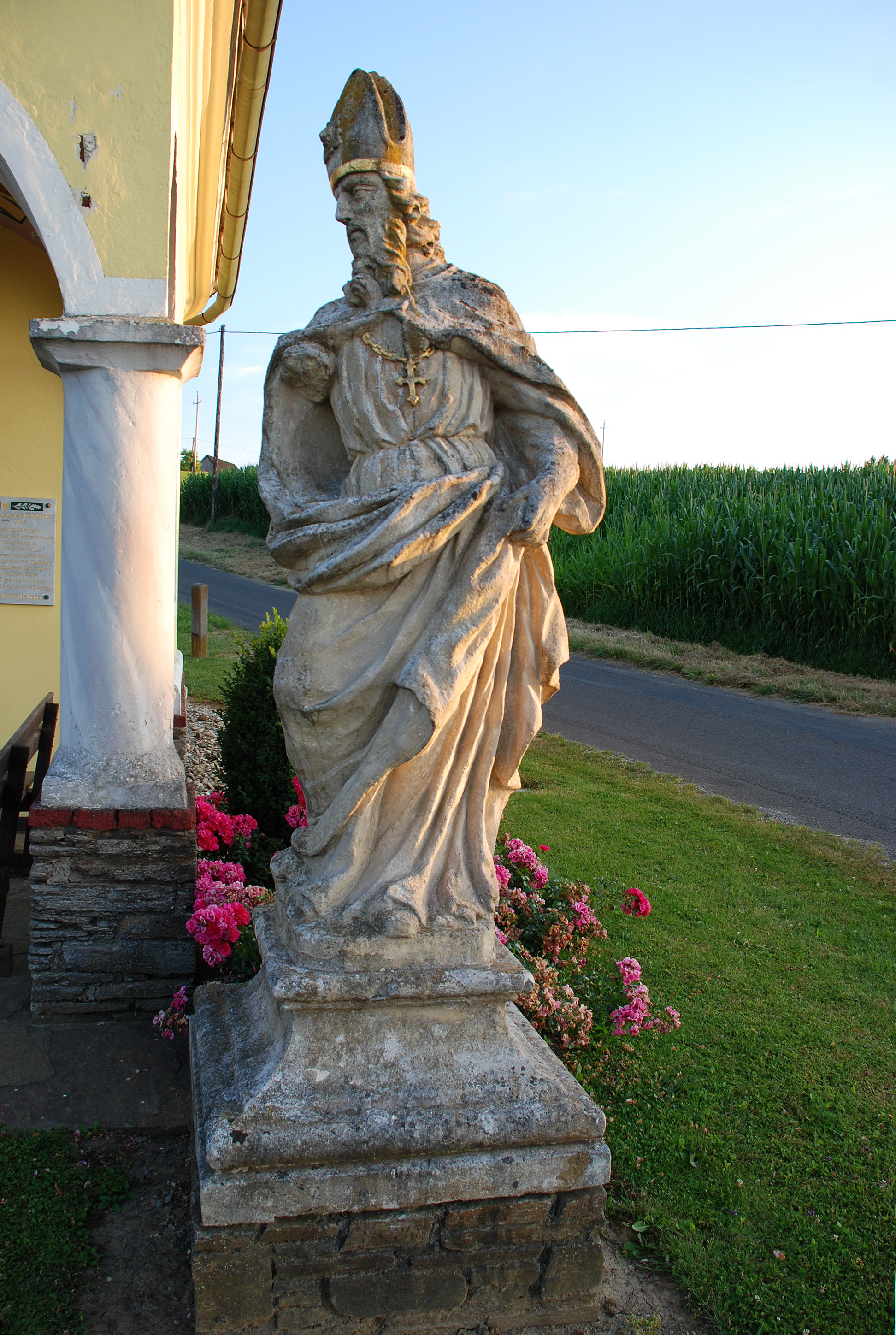 Herbersdorf bei Stainz, Rassach, Steiermark, Österreich: Wegkapelle Object location46° 52′ 22.21″ N, 15° 18′ 04.77″ E